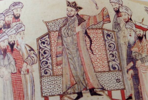 Onur Kaftanının verilişi, Raşidüddin, Jami' al-tawarih, 1314 (Edinburg Üniversitesi Kütüphanesi)